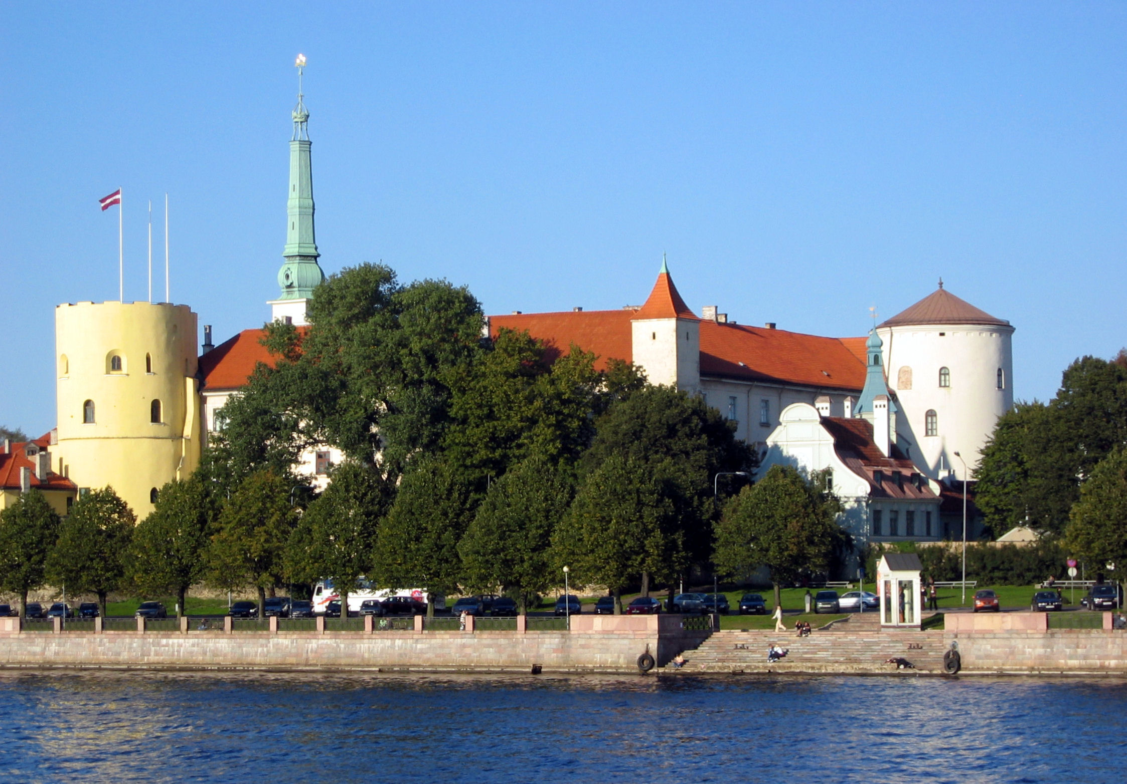 Riga Castle (Rigas pils), Riga, Latvia, Europe. Photo: Britt Storlykken Helland, 2006.00.15.